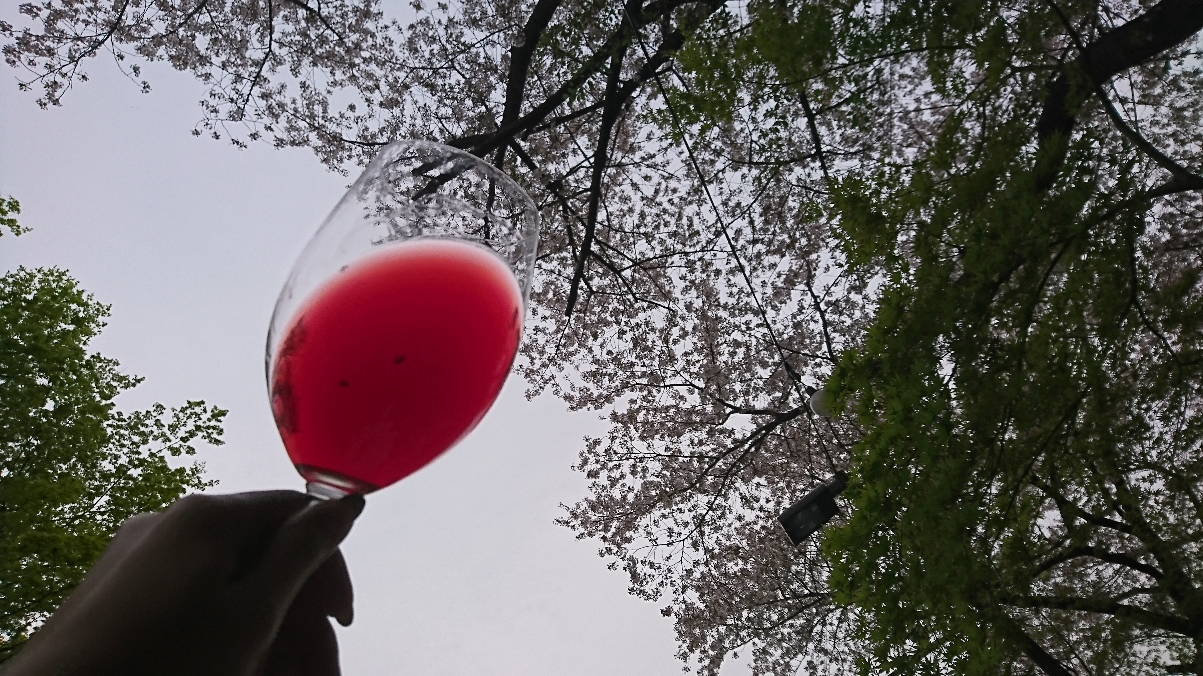 투명한 레드와인